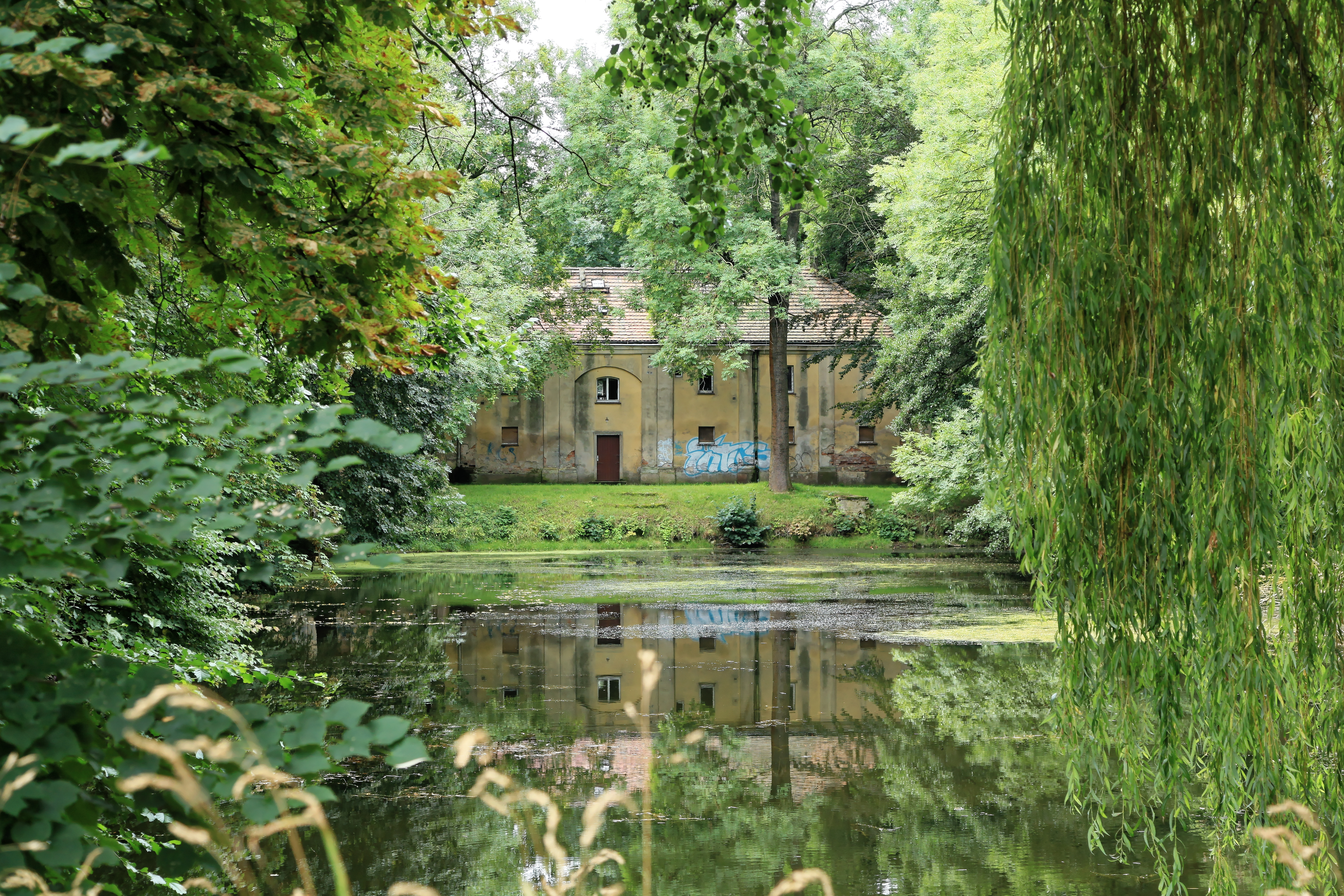 Orangerie hinter dem Mühlenteich im Schlosspark Schönwölkau, Kirchplatz in Wölkau, Schönwölkau